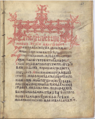 Банишкое Евангелие